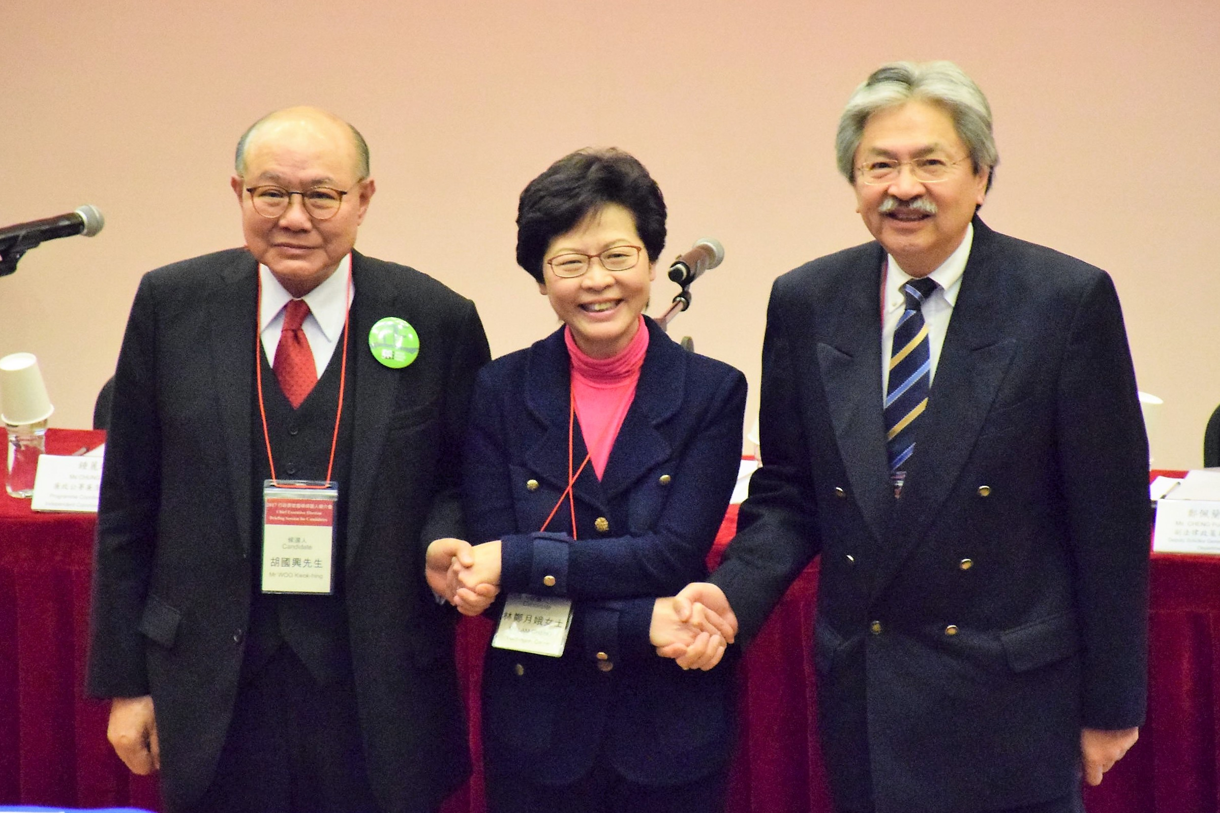 中文（香港）: 香港特首選舉三名候選人曾俊華(右起)、林鄭月娥、胡國興 (美國之音湯惠芸)